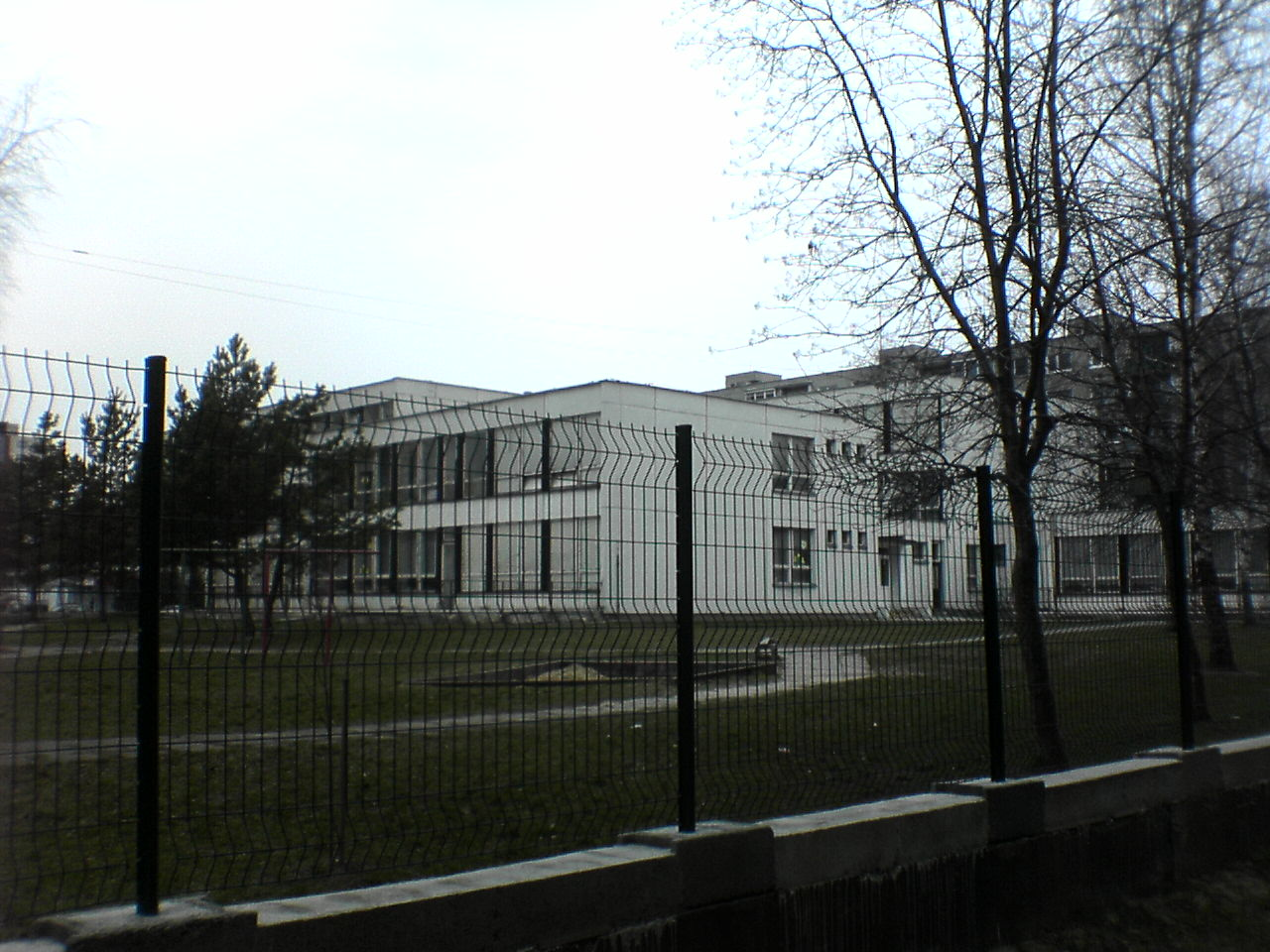 Podbreziny materská škola